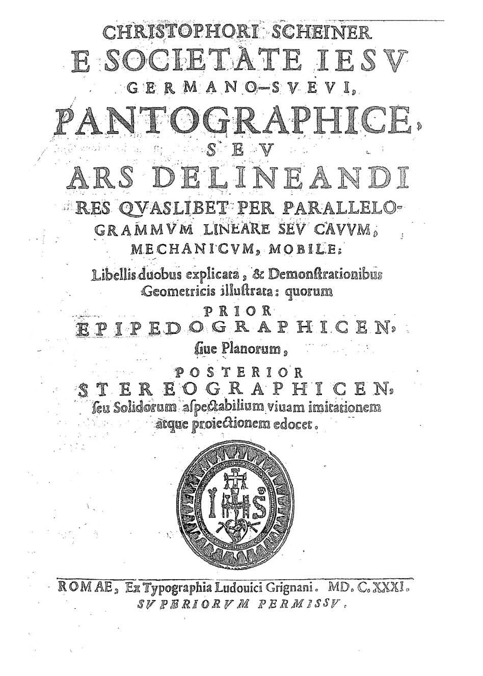 Christophori Scheiner ... Pantographice, seu Ars delineandi res quaslibet per parallelogrammum lineare seu cauum, mechanicum, mobile; libellis duobus explicata, & demonstrationibus geometricis illustrata: quorum prior epipedographicen, siue planorum, posterior stereographicen, seu solidorum aspectabilium viuam imitationem atque proiectionem edocet. - Romae : ex typographia Ludouici Grignani, 1631. - [12], 108 p. : ill. calcogr. ; 4º .